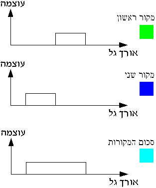 יצרתי בעצמי